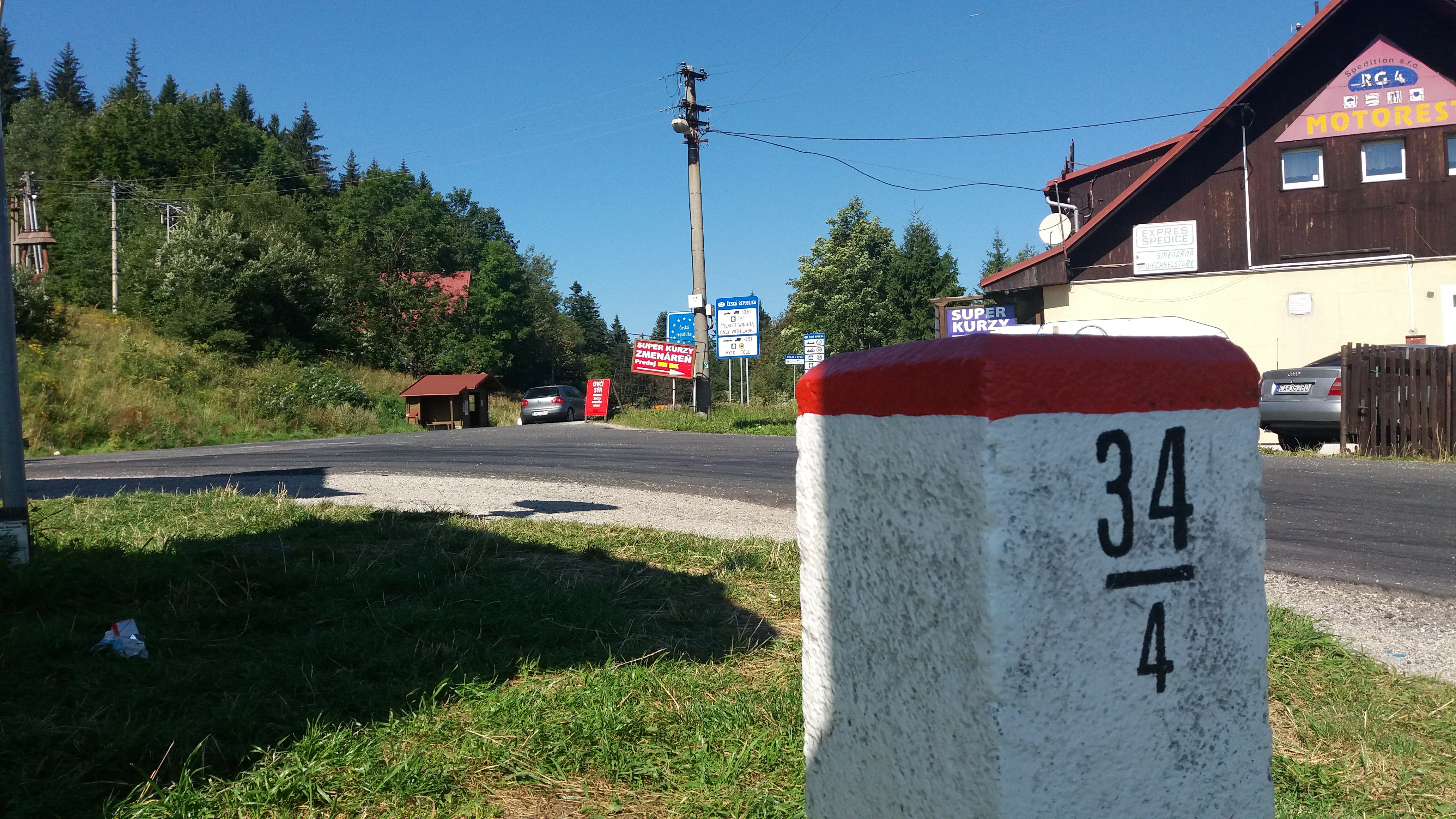 Hraniční kámen mezi Českem a Slovenskem.